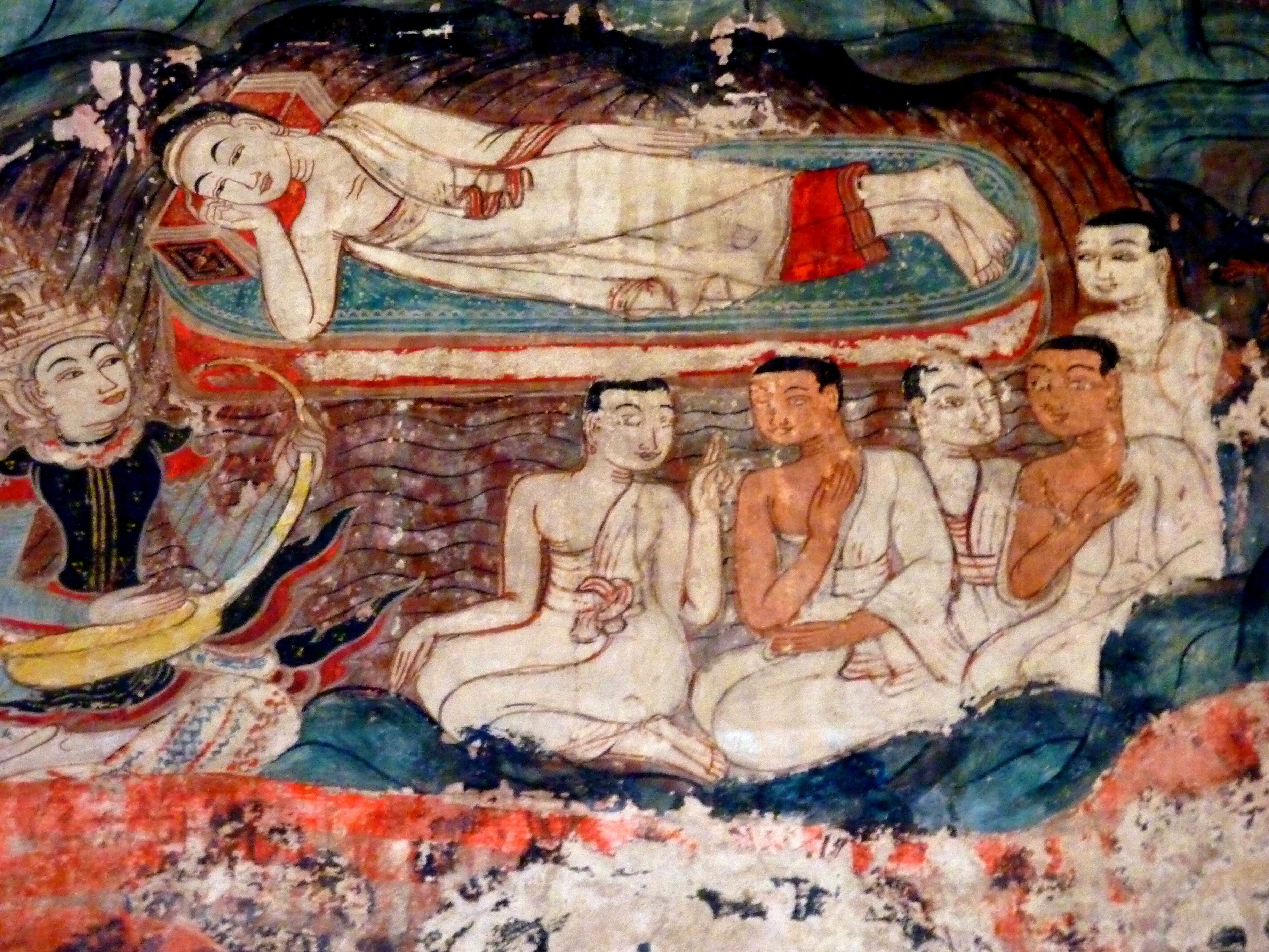 06 Parinibbana (detail), Wat Buak Krok Luang, Chiang Mai